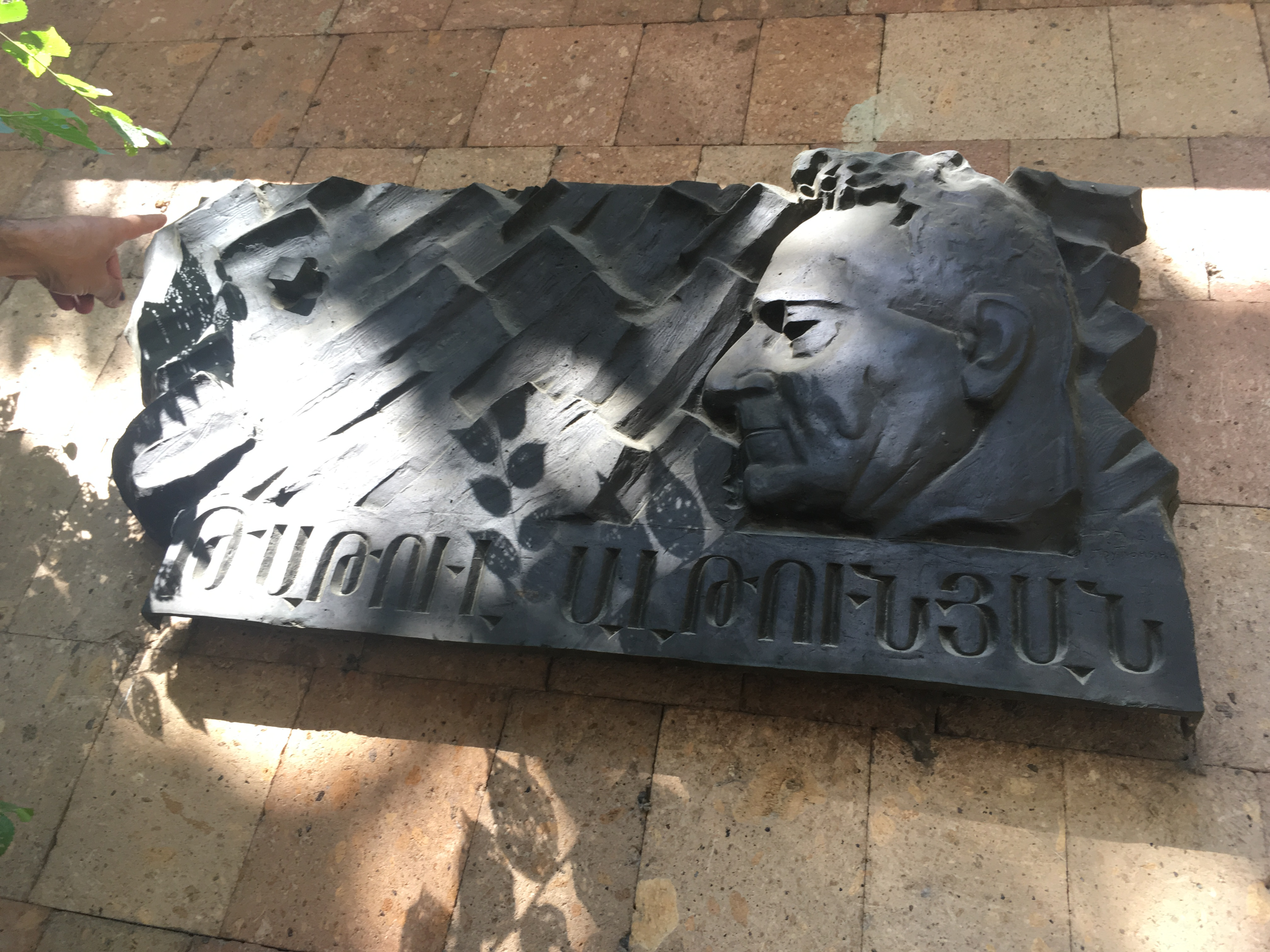 Мемориальная доска народного артиста СССР Татула Алтуняна